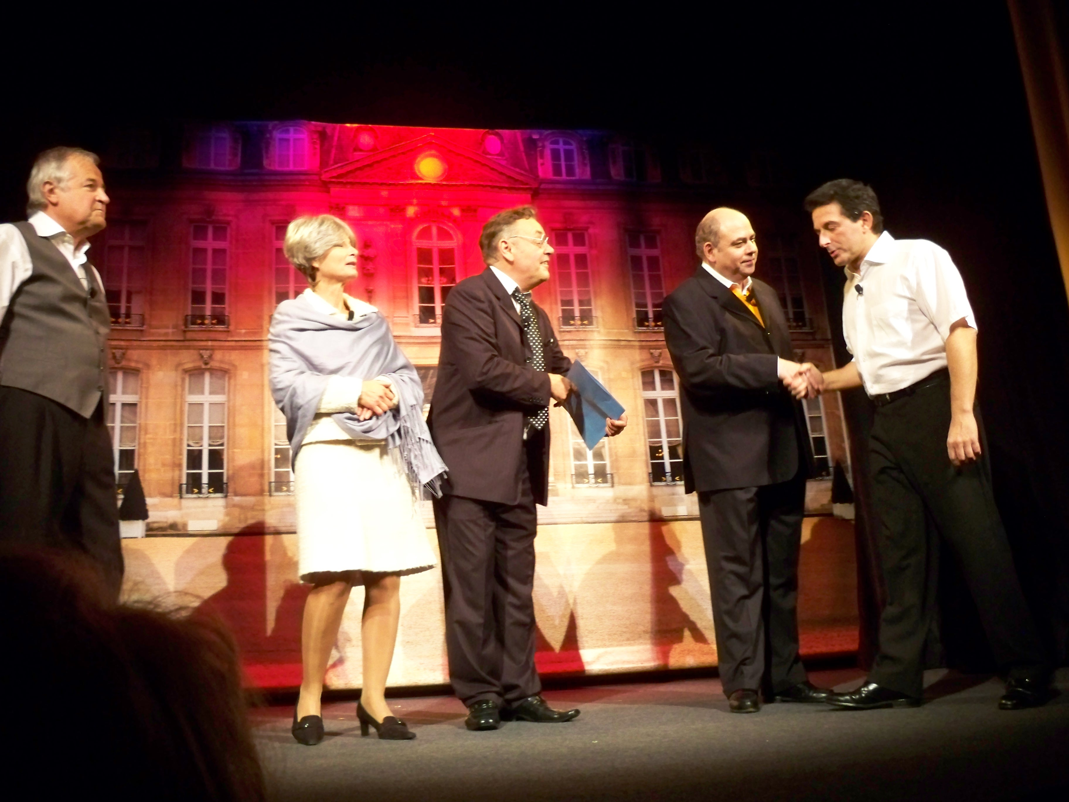 Un des tableaux du spectacle "p'tit coup de pompe à l'Elysée" avec Michel Guidoni